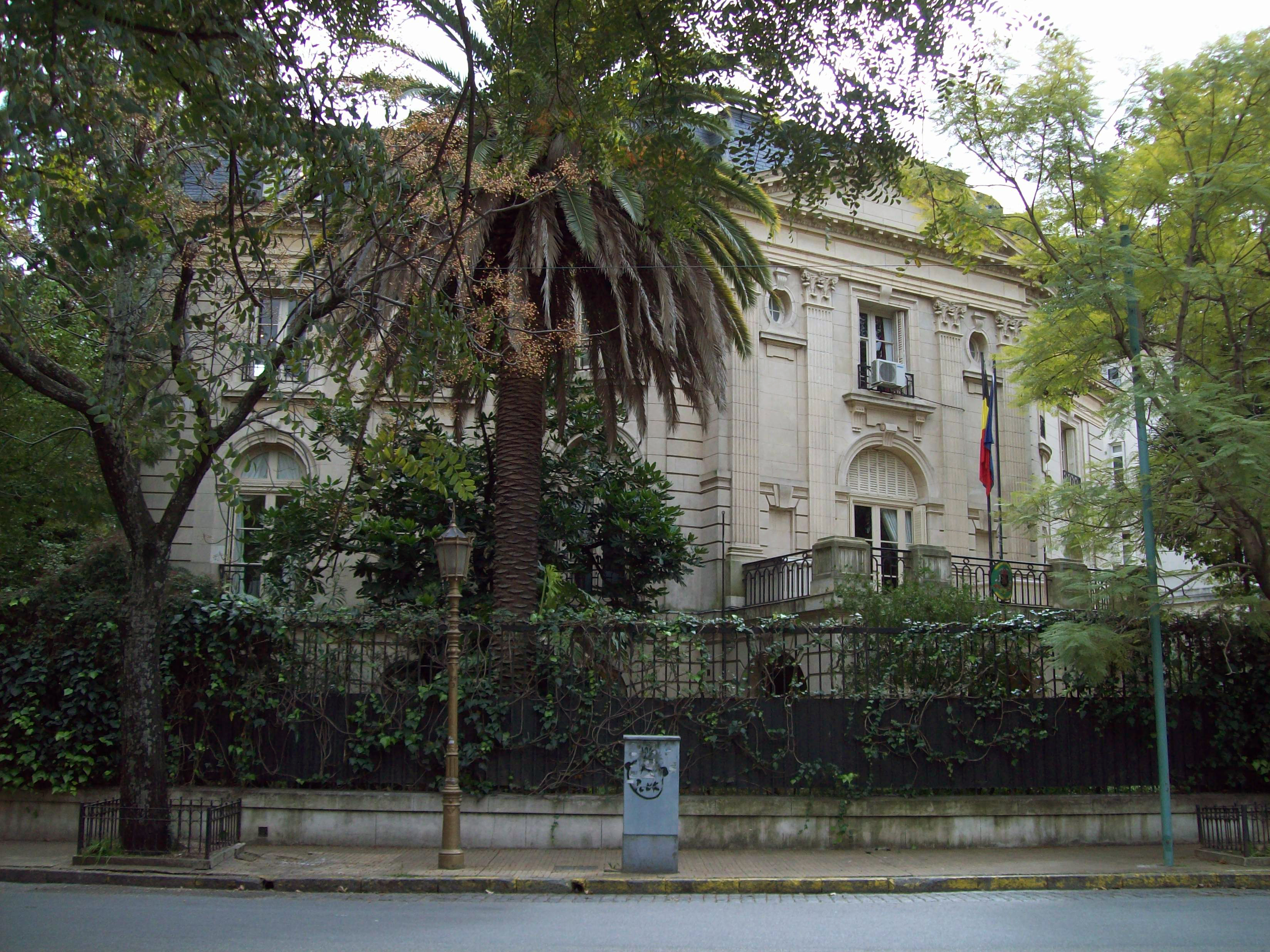 Embajada de Bélgica, en Palermo Chico, Buenos Aires.